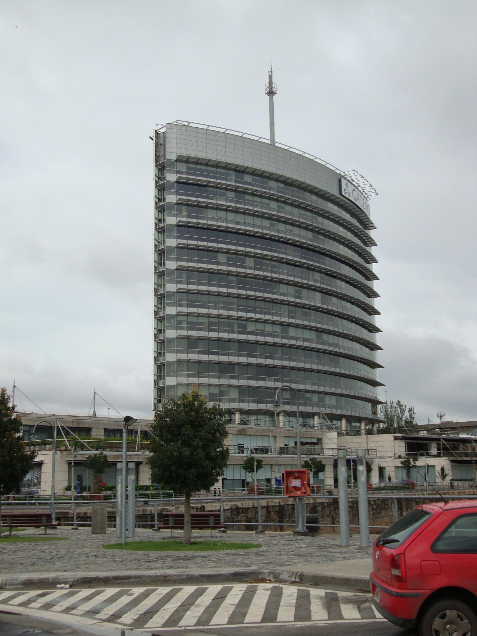 El Edificio Malecón, obra del estudio norteamericano H.O.K. International. Puerto Madero, ciudad de Buenos Aires, Argentina.